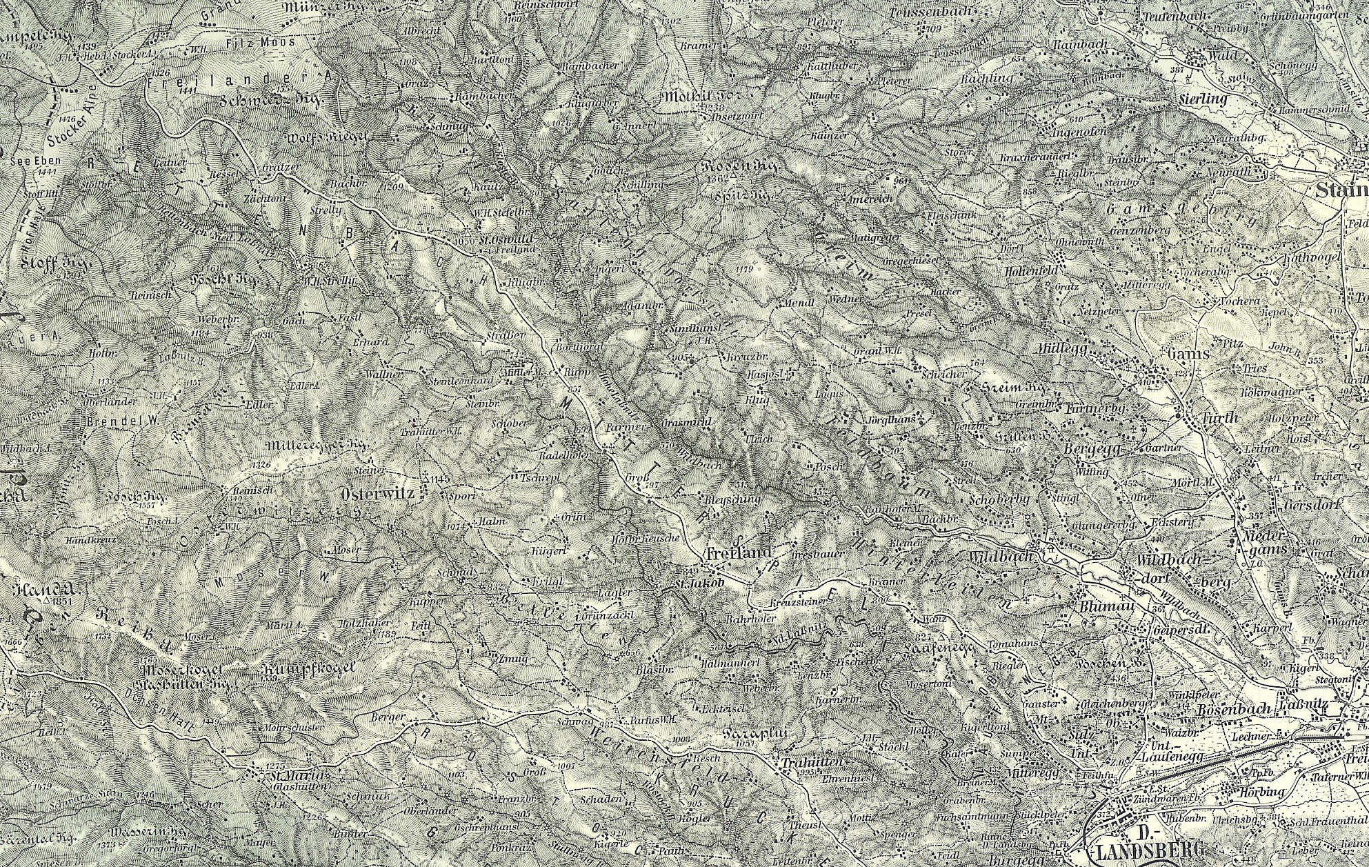 Schwarzkogelzug von der Freiländer Alm bis Deutschlandsberg